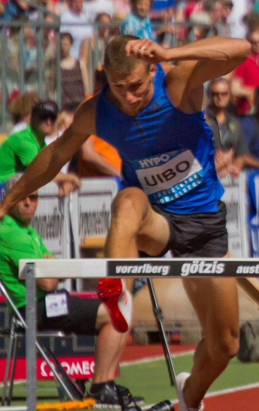 242 pittomvils 110mH